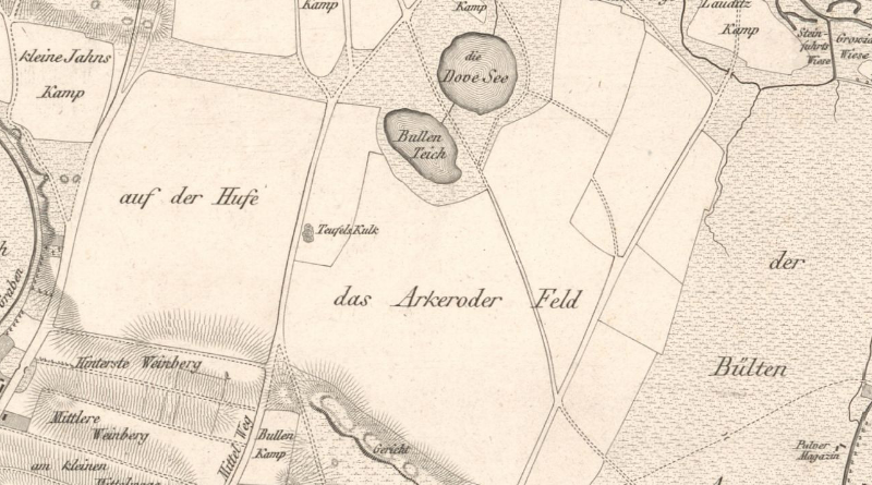 Die Flur Arkeroder Feld bzw. auch Ärkeroder Feld in Braunschweig um 1835. Auf diesem Feld entstand ab den 1920er Jahren das Siegfriedviertel.